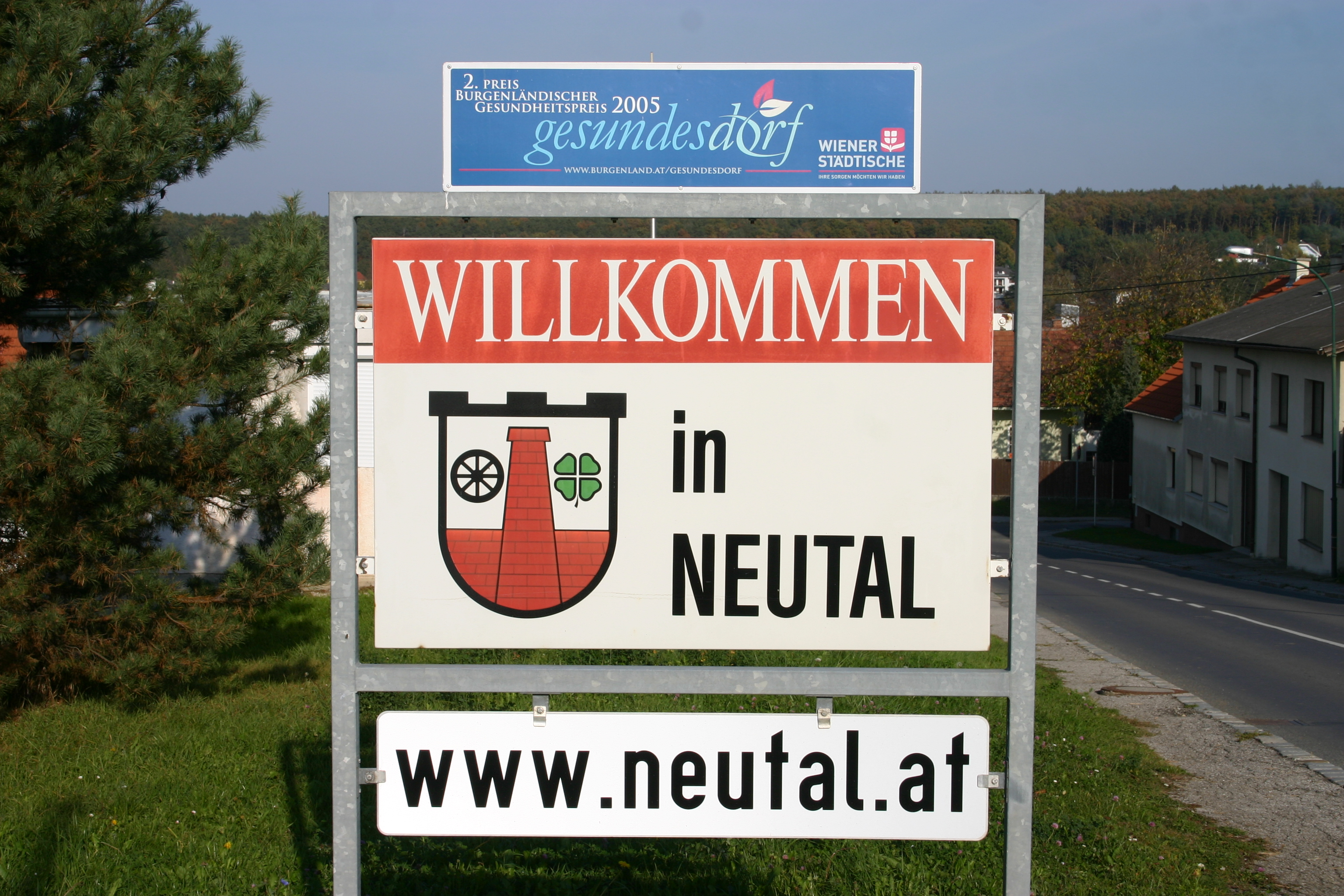 Neutal – Willkommenstafel